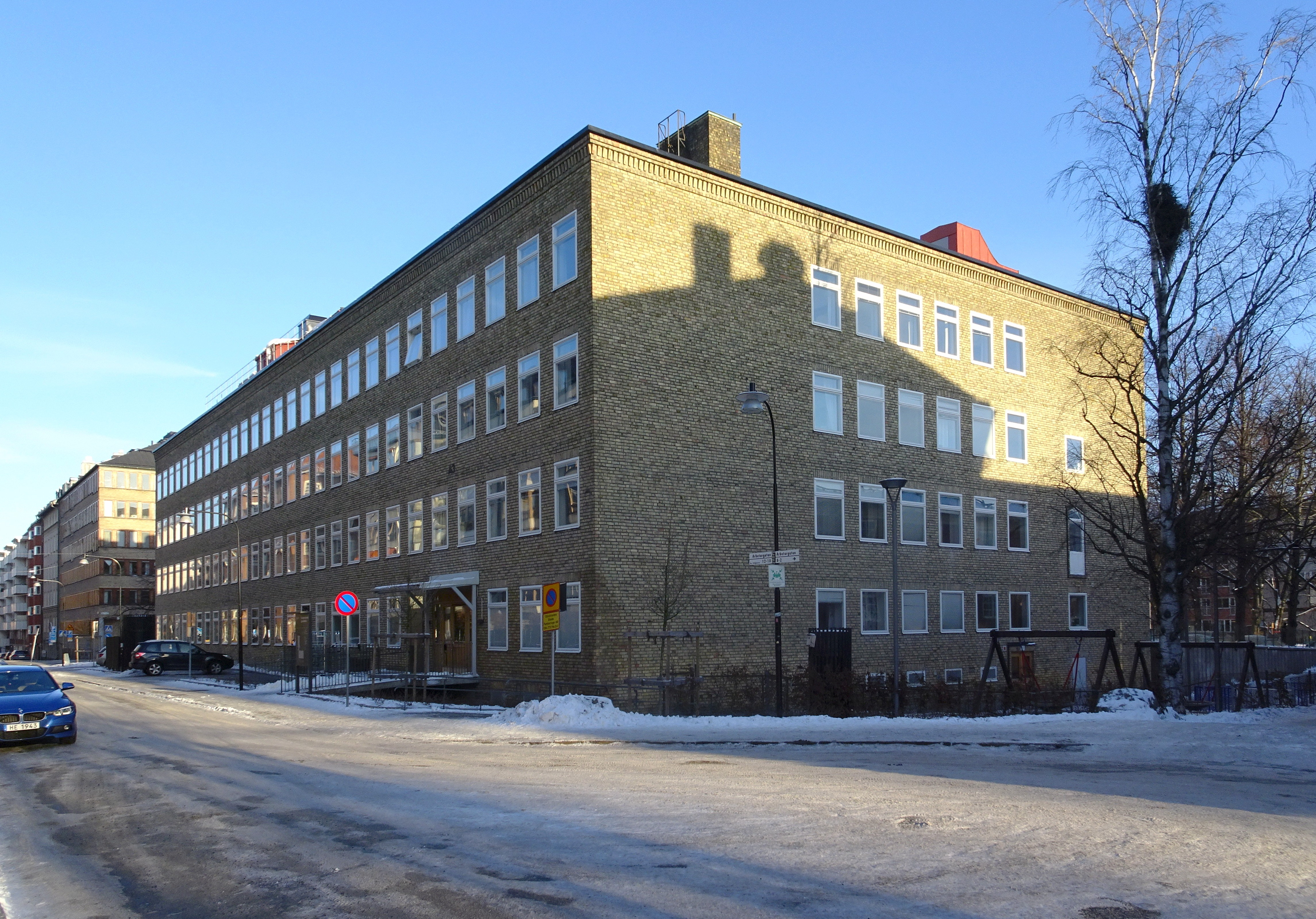 Kungsholmens grundskola, f.d. Handelsskolan, Arbetargatan 12, arkitekt Paul Hedqvist